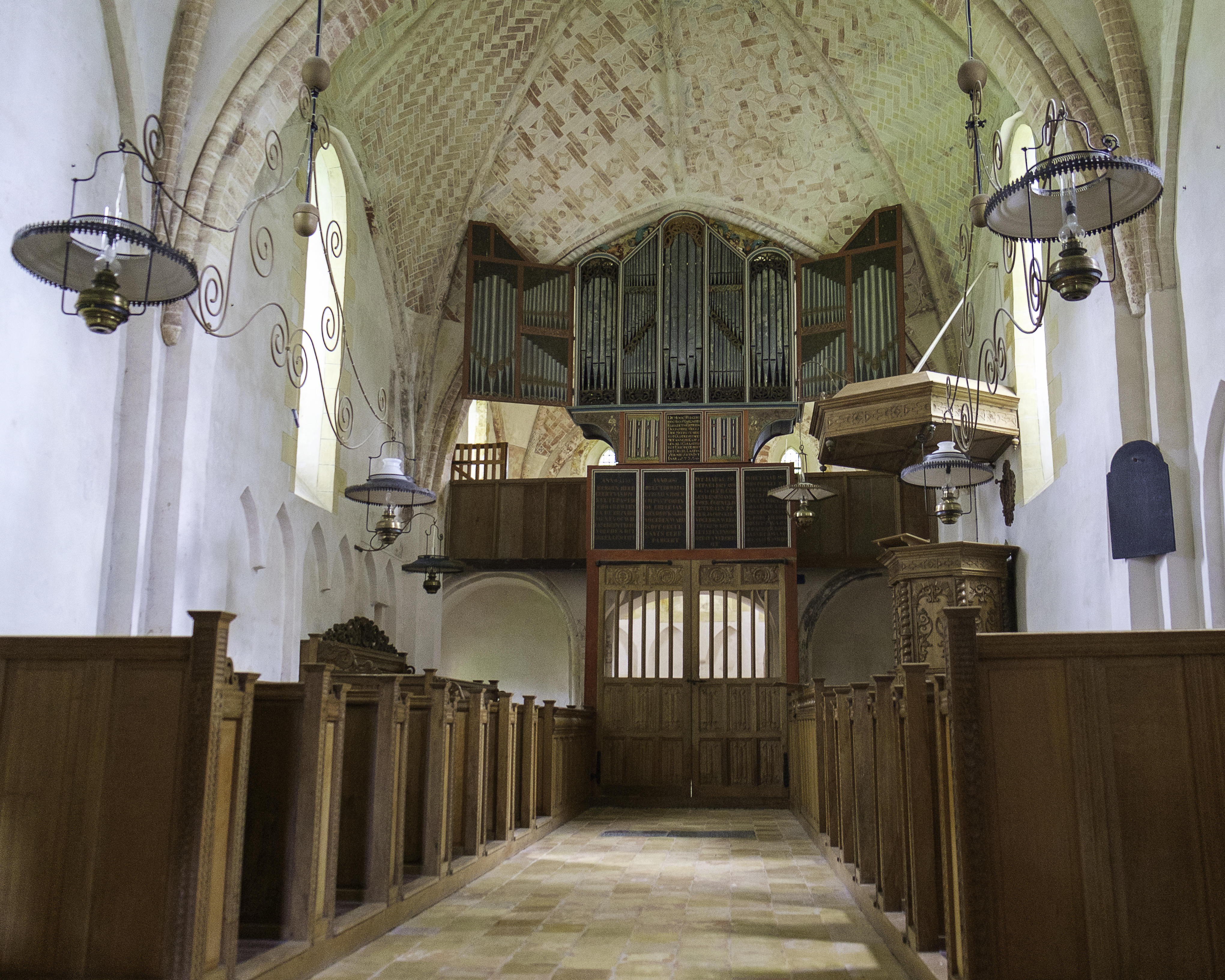 Interieur van de Mariakerk in Krewerd